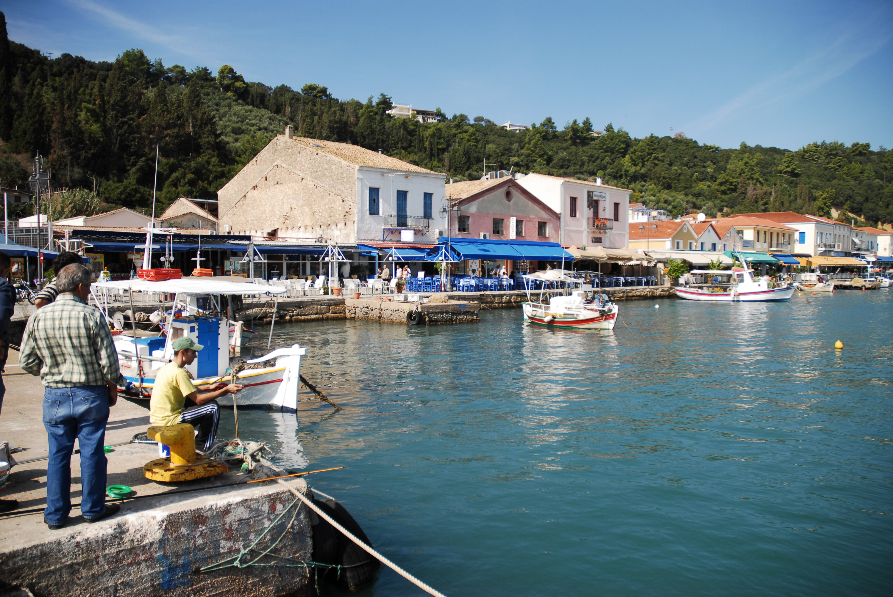 Katakolo esplanade. Pyrgos, Western Elis, Greece.